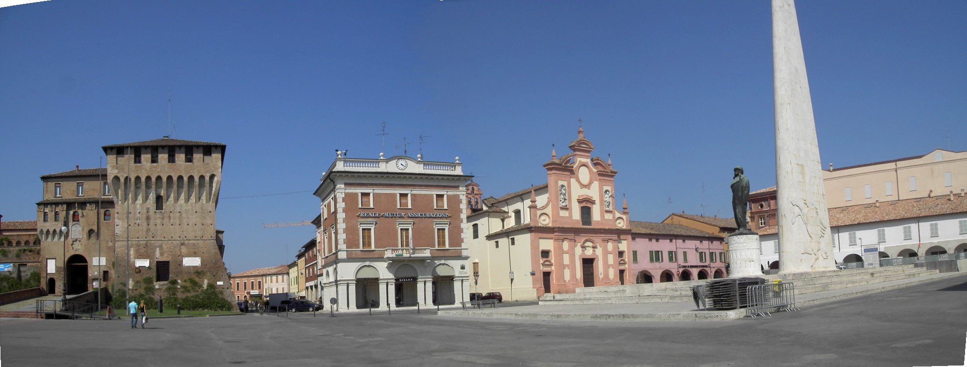 Lugo (RA), la piazza del mercato